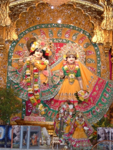 Radha krishna_manor